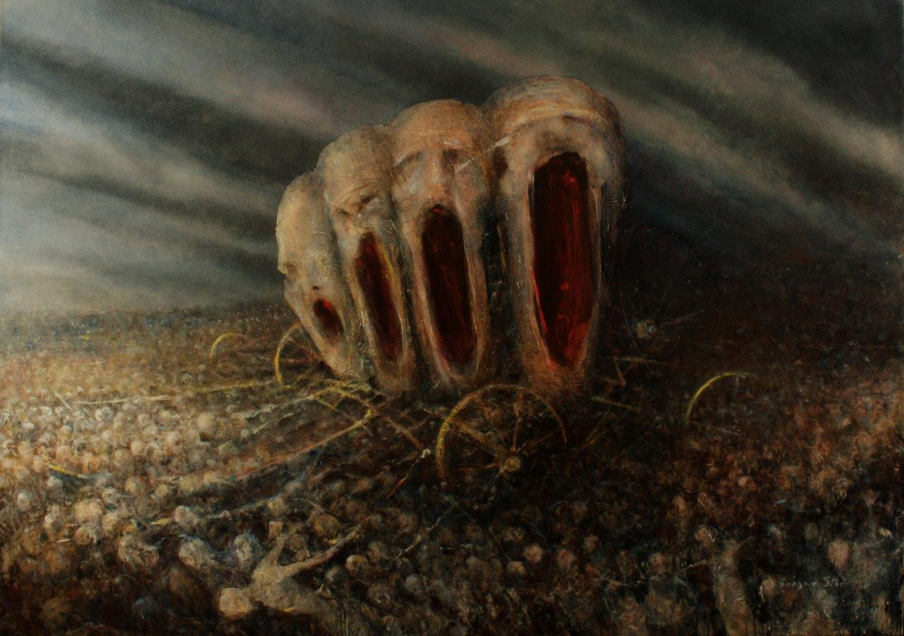 Grzegorz Stec "Wóz krzyku" III, 2015, Oel auf Leinwand, 100x140